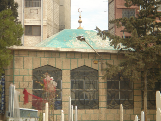 جامع الصحابي الجليل دحيه الكلبي التي تنتسب له قبيلة الشرارات